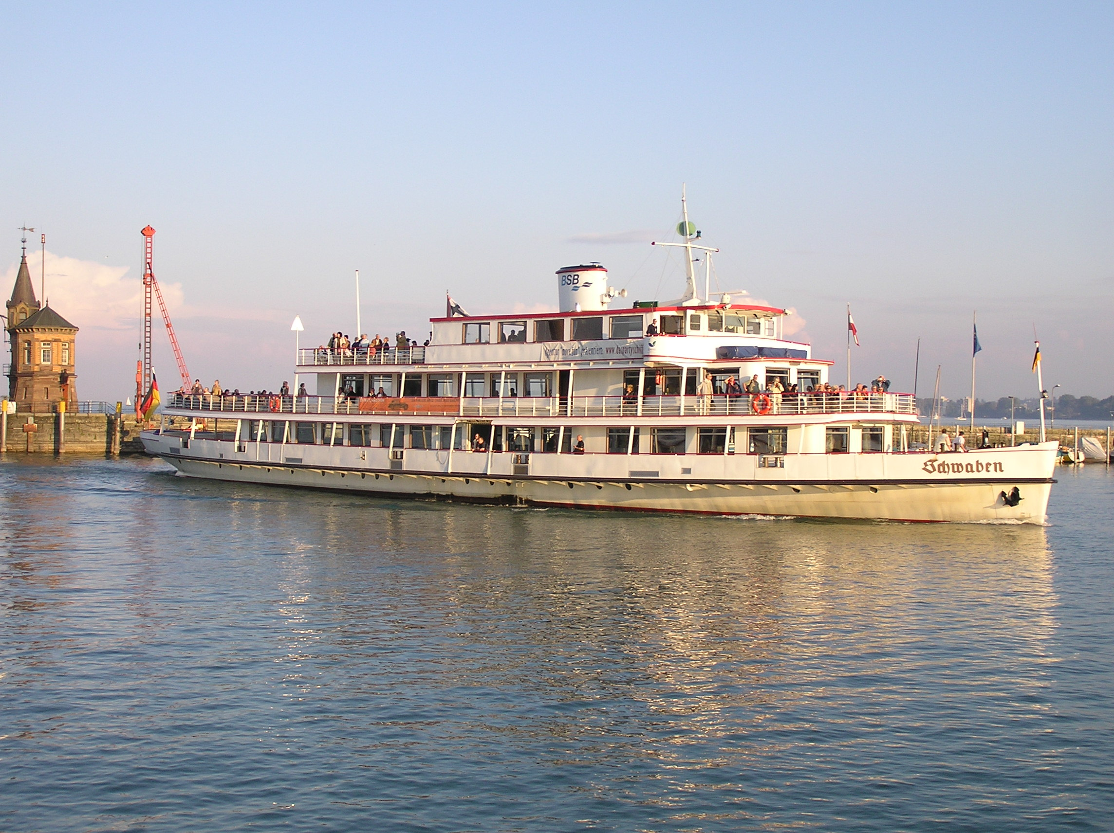 Objekt: Bodensee-Schiff MS Schwaben